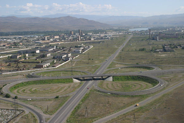 Развязка М54(804км) и А162 (8км) около Кызыла